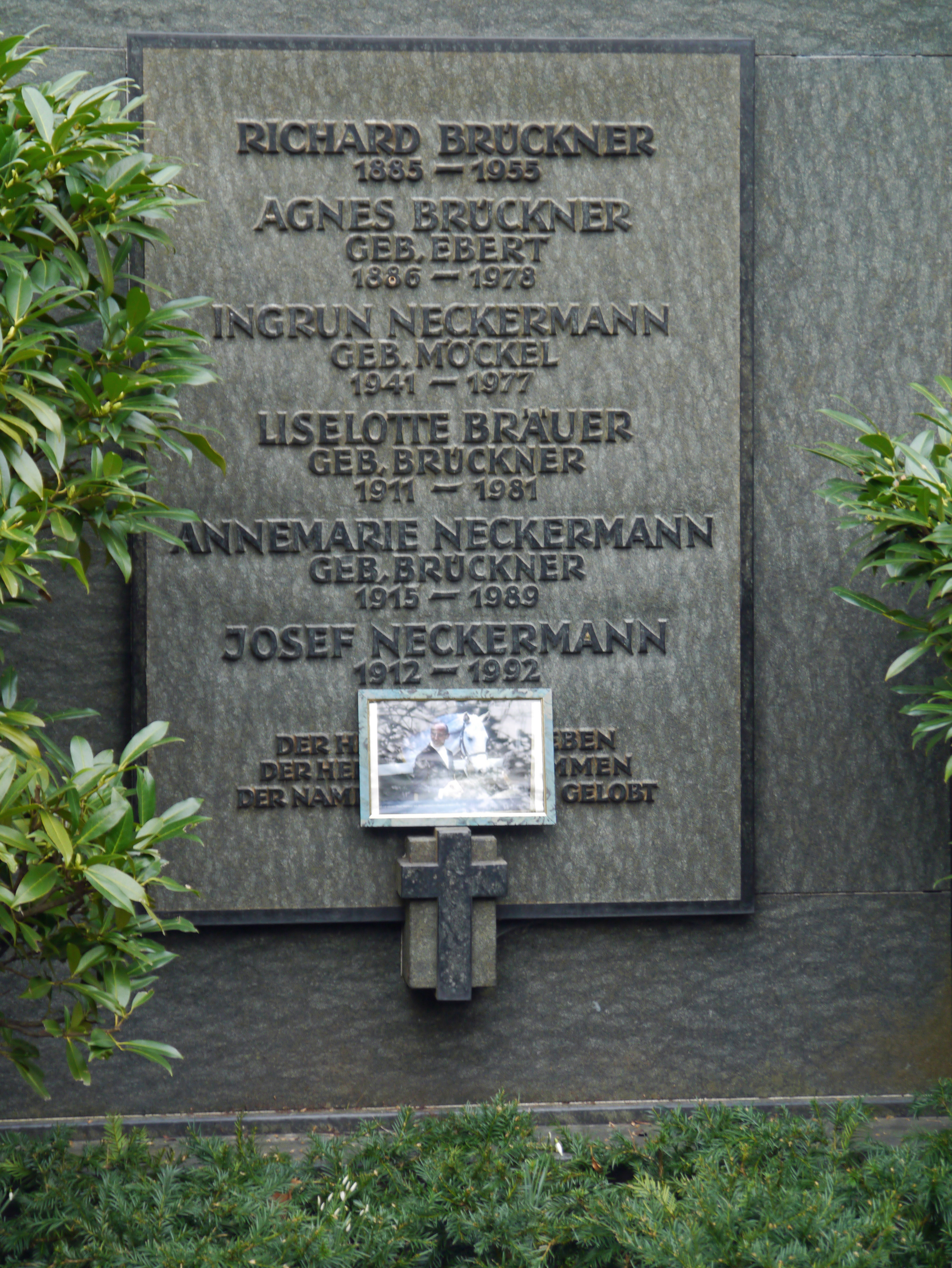 Familiengrab der Familie Neckermann auf dem Frankfurter Hauptfriedhof.